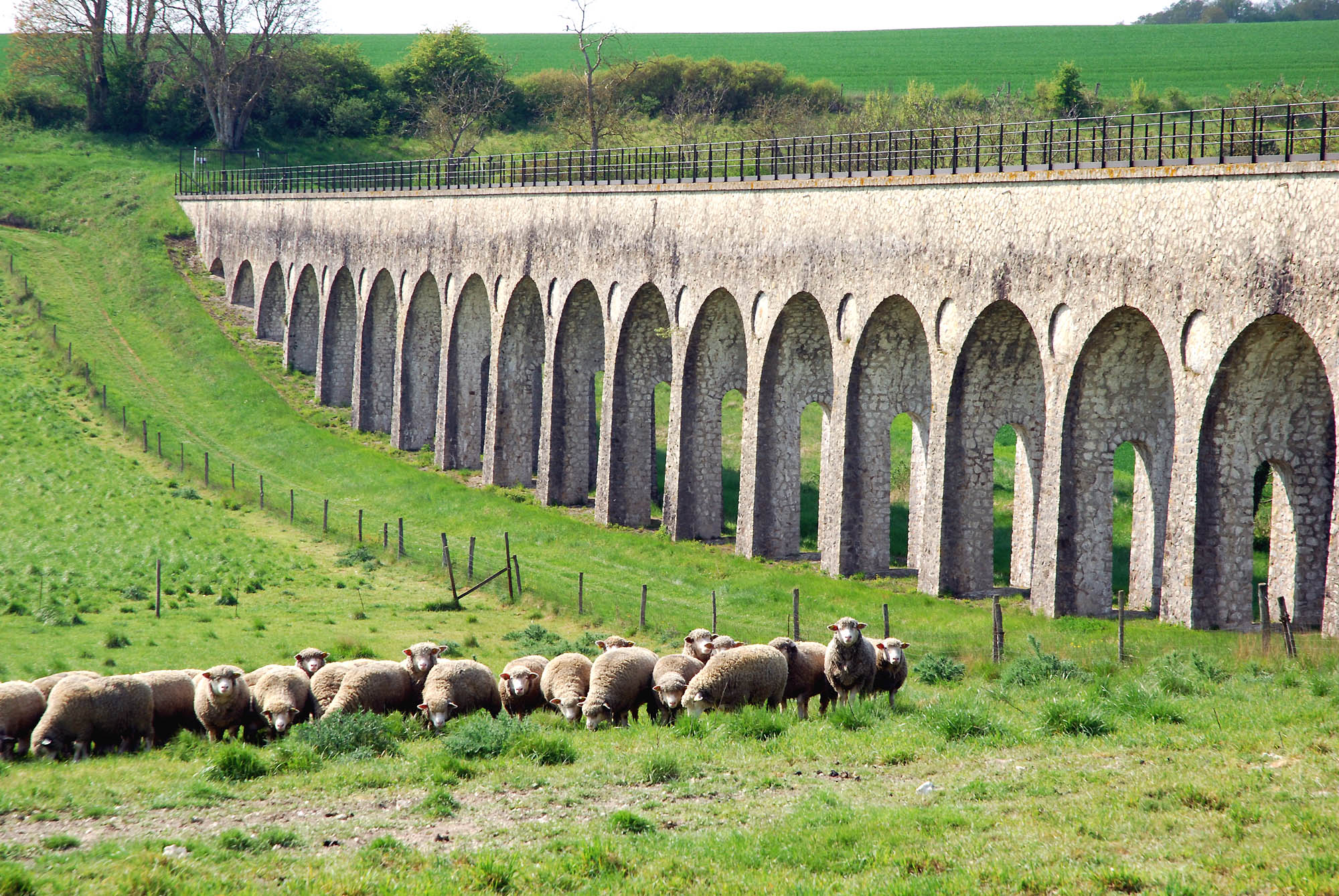 Aqueduc de la Vanne à Pont-sur-Vanne (Yonne, France)